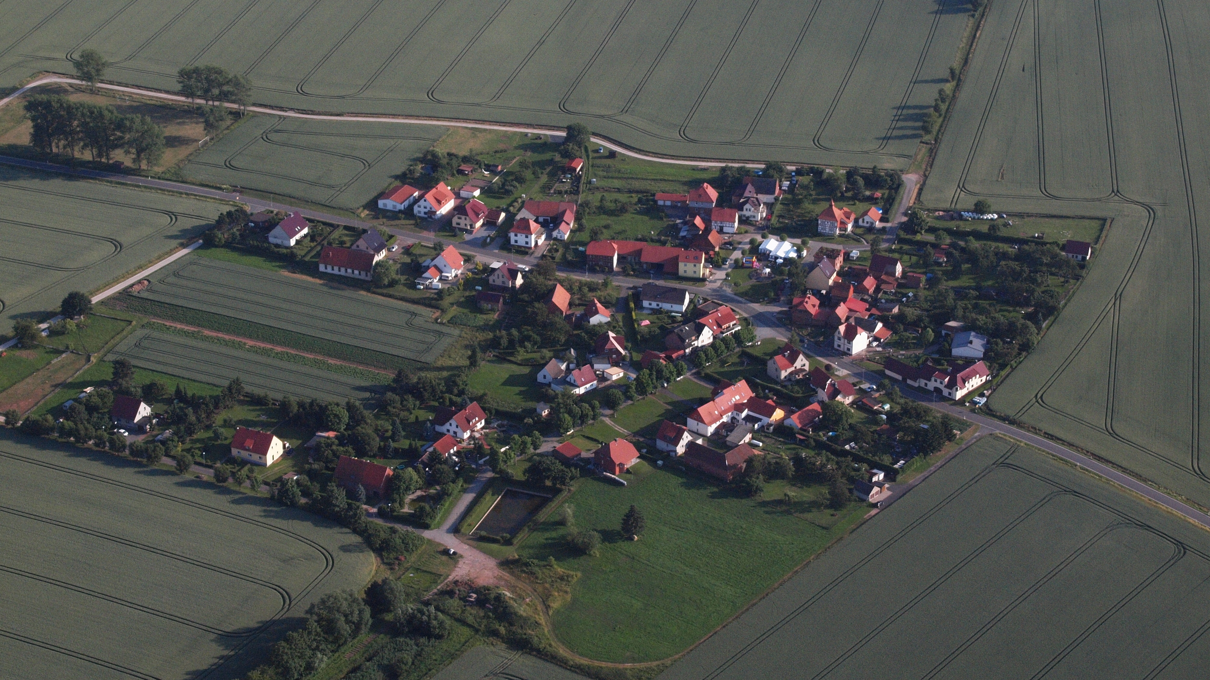 Bleckenrode, Teistungen: Luftaufnahme